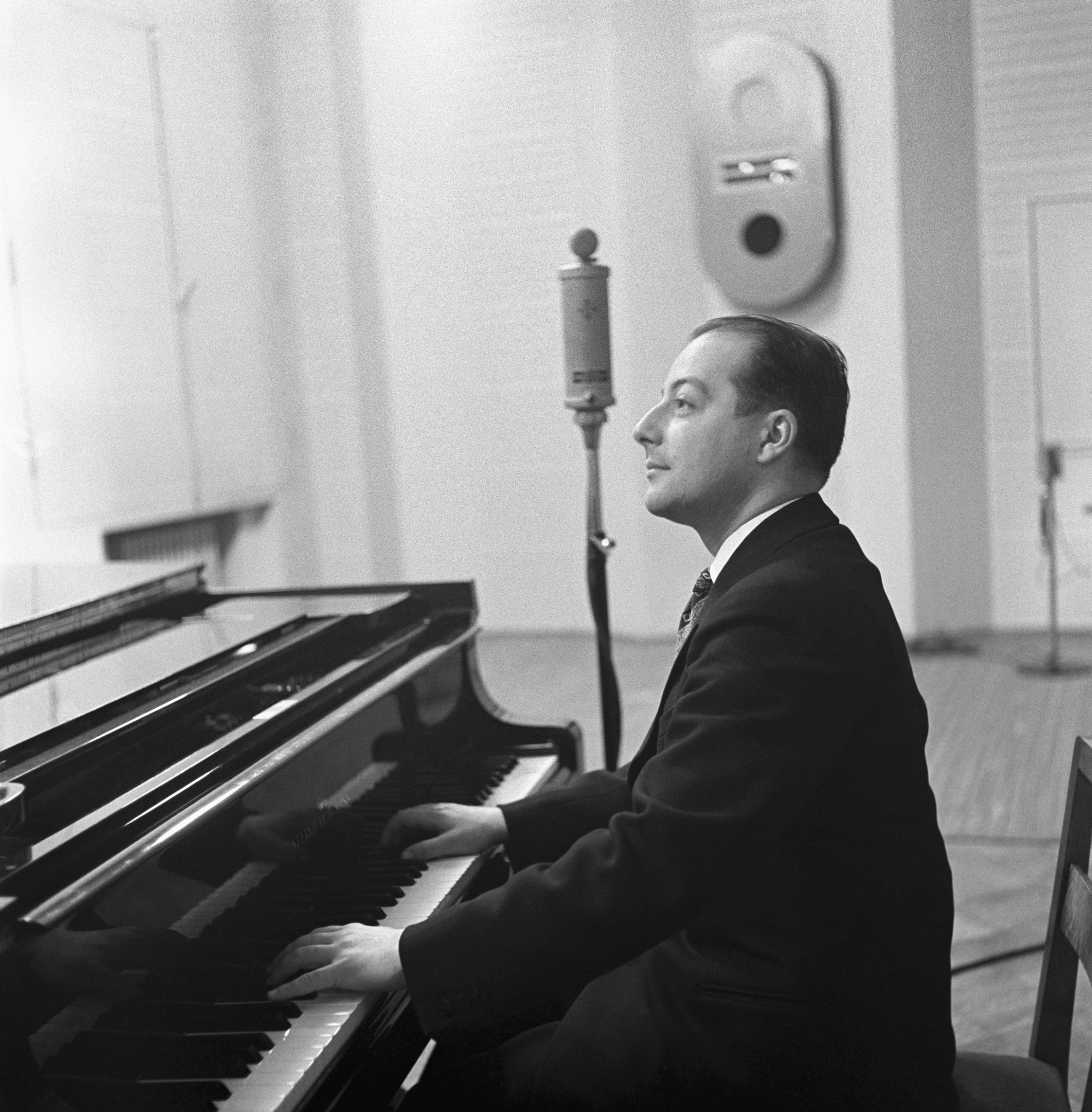 Kapellimestari George de Godzinsky soittaa flyygeliä radiostudiossa, kuvausaika arvioitu vuoden tarkkuudella. Tiedätkö jotain tästä kuvasta? Jätä kommentti tai ota yhteyttä sähköpostitse: Tutustu Ylen arkistosisältöihin: Fler skatter från Yles arkiv: More about Yle, the Finnish Broadcasting Company